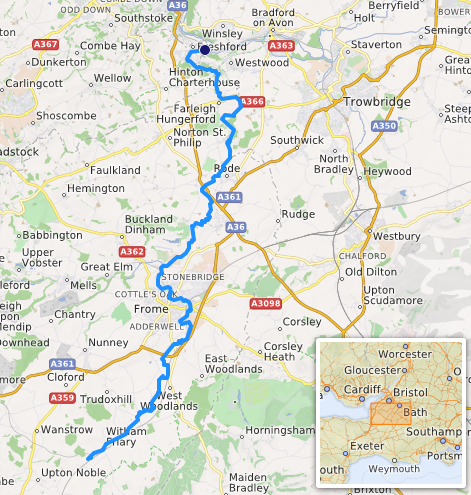 carte réalisée sur umap [1] This map may be incomplete, and may contain errors. Don't rely solely on it for navigation.